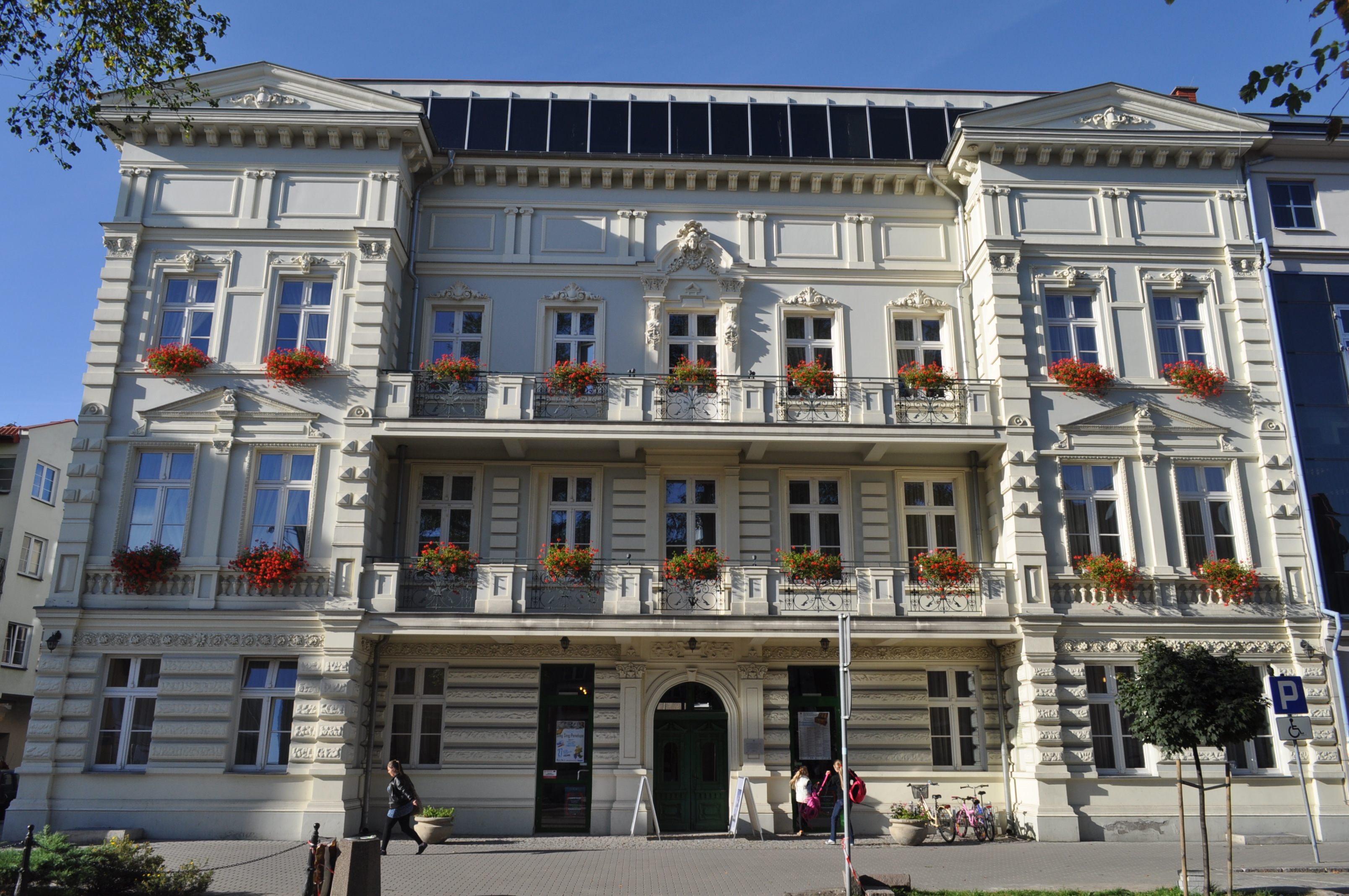 Ełk - budynek mieszkalno handlowy, obecnie szkoła muzyczna